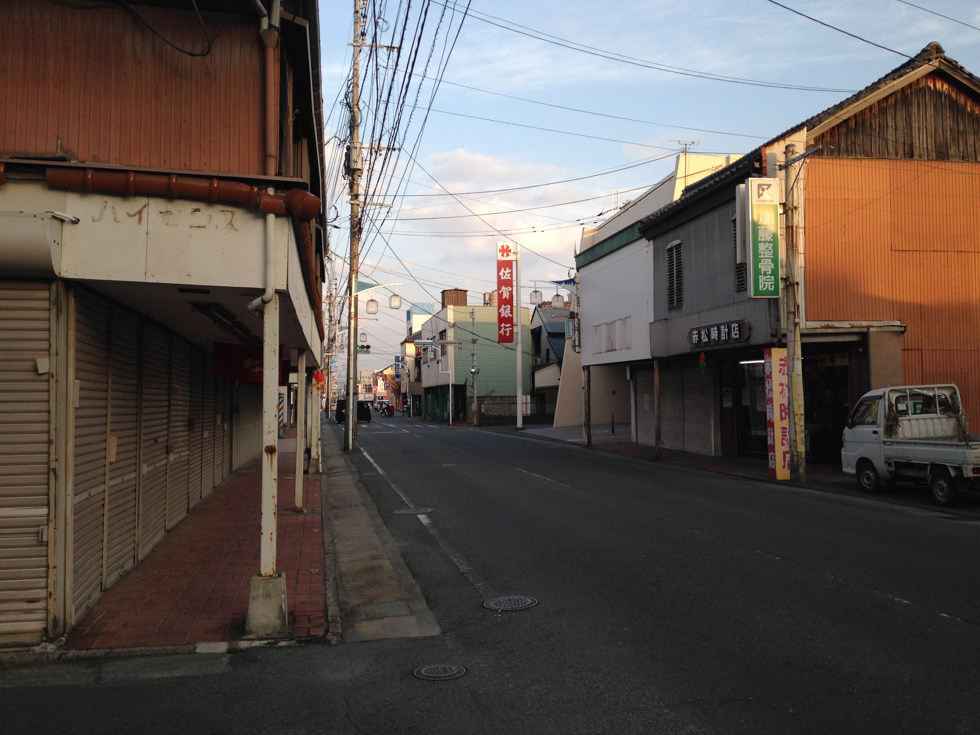 福岡県柳川市・京町商店街